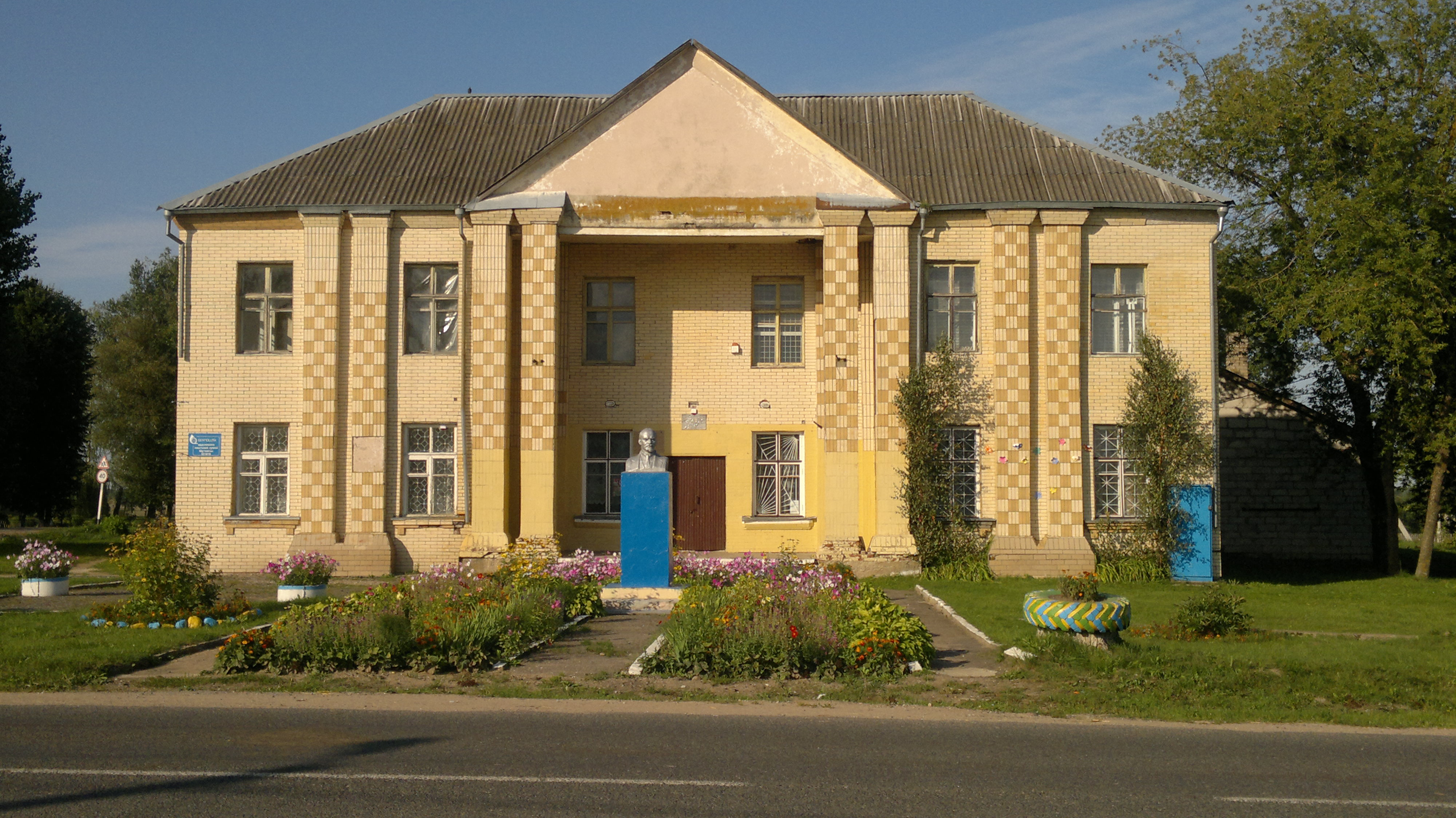 Дом Культуры, деревня Шутовичи